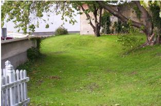 Del af volden, Nakskovs fæstning